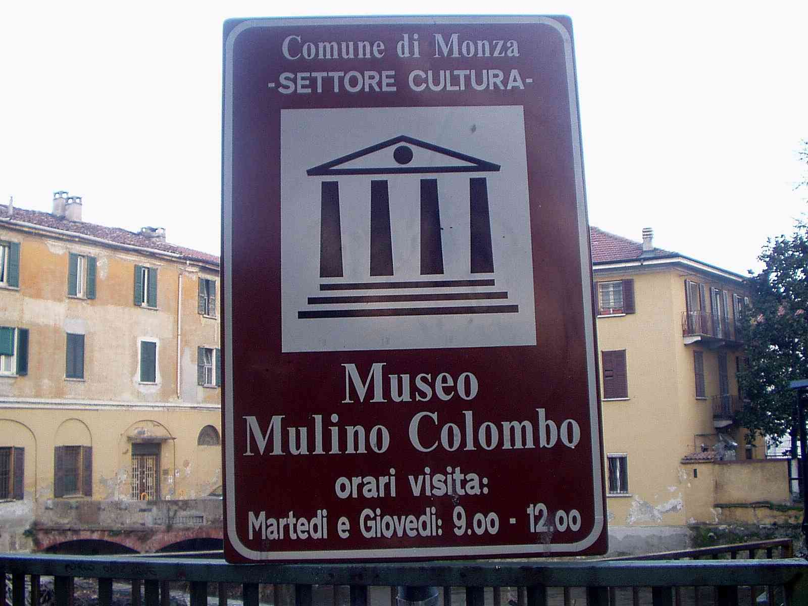 MB Monza targa Museo Mulino Colombo